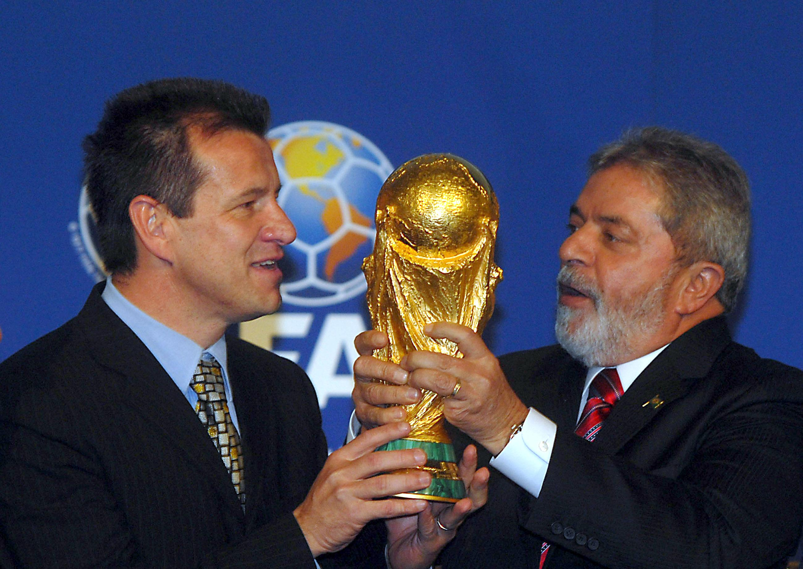 Zurique (Suíça) - O presidente Luiz Inácio Lula da Silva e o técnico da seleção brasileira, Dunga, seguram taça na cerimônia que confirma o Brasil como sede da Copa do Mundo de 2014.